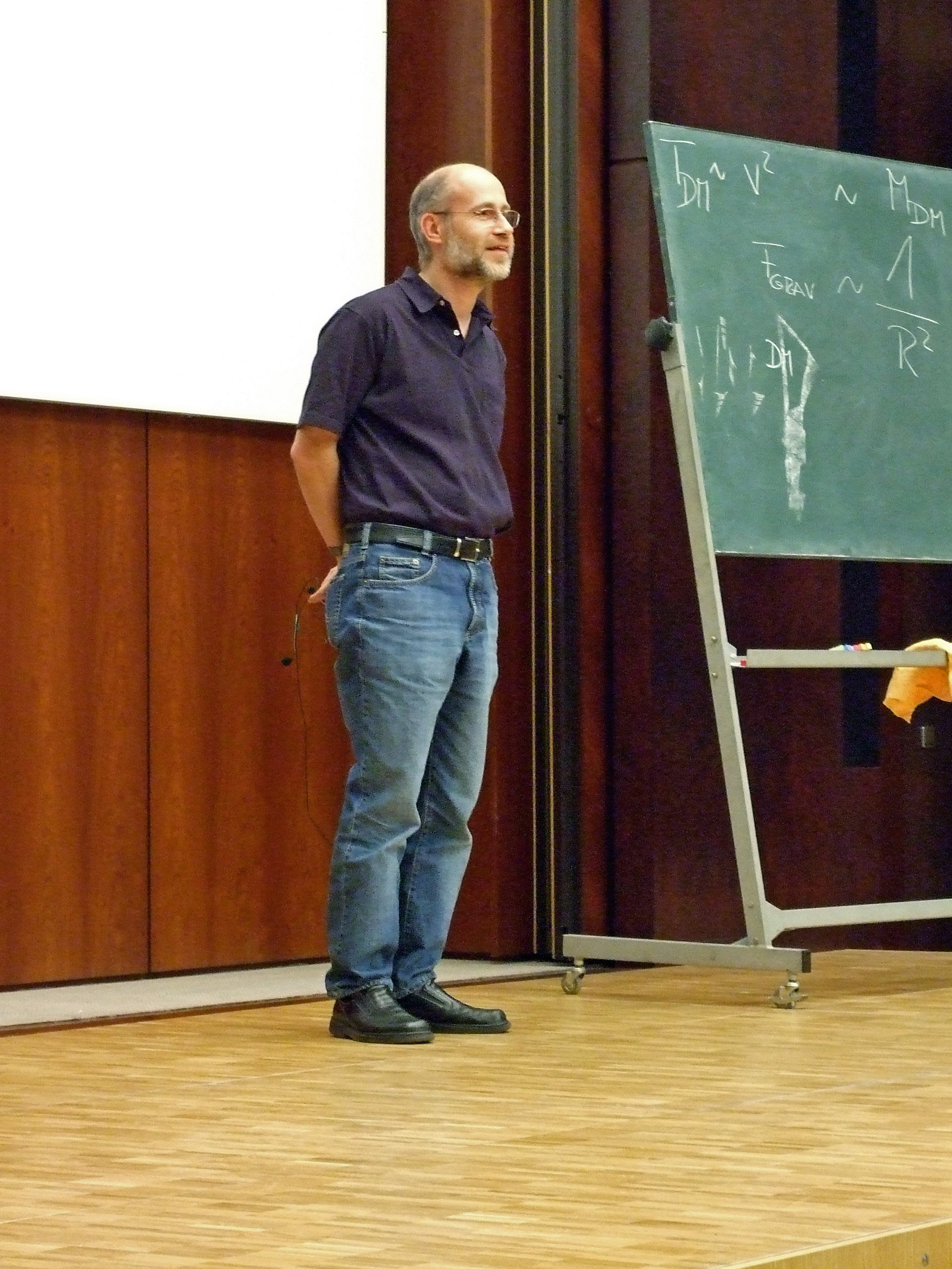 Harald Lesch, während seines öffentlichen Vortrages über schwarze Loecher, Materie und Energie, 2007 in Ffm